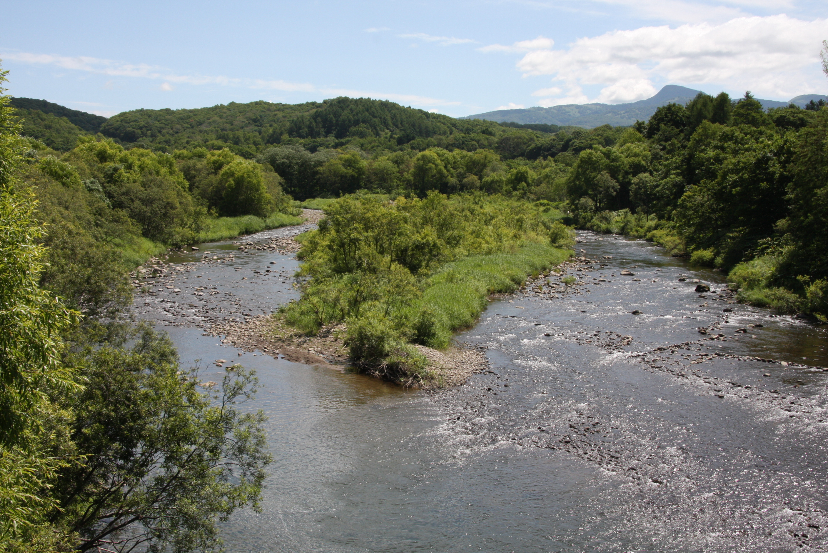 尻別川 湯山別橋より下流を望む